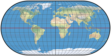 eckert 3